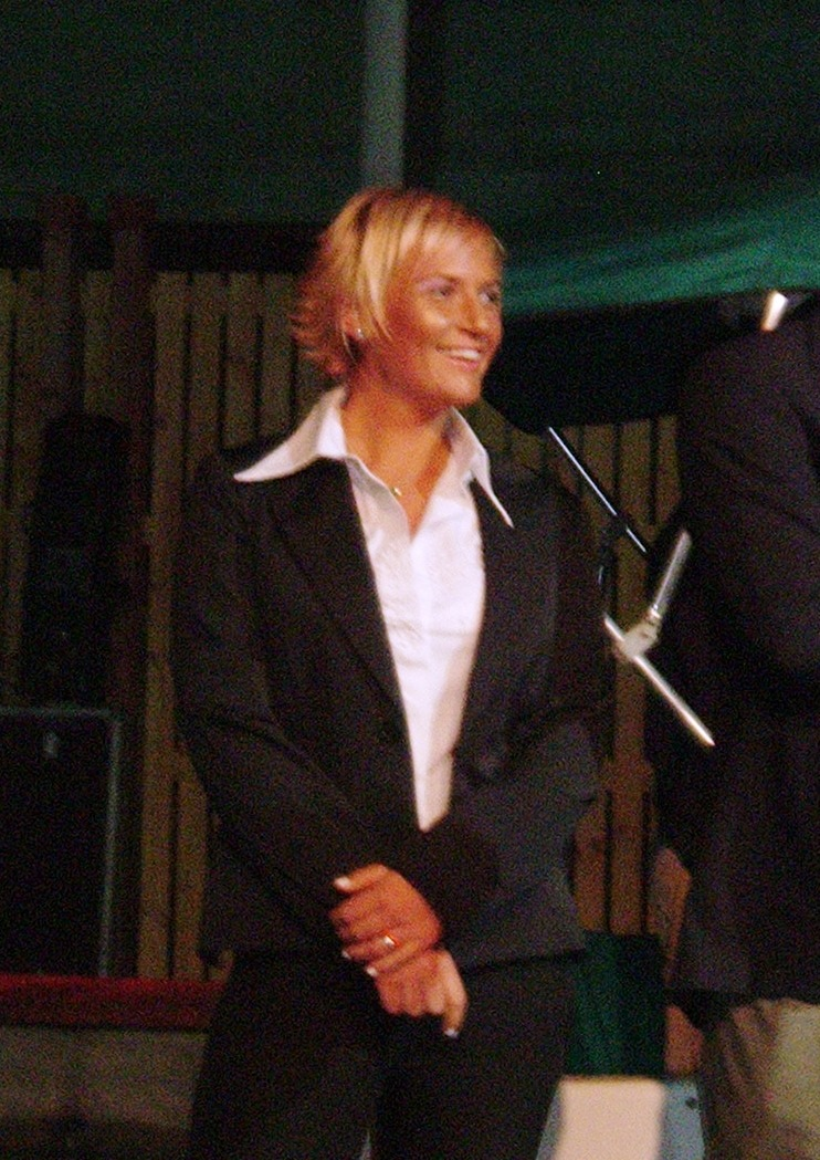 La golfista Nicole Perrot en la inauguración de MallSport.